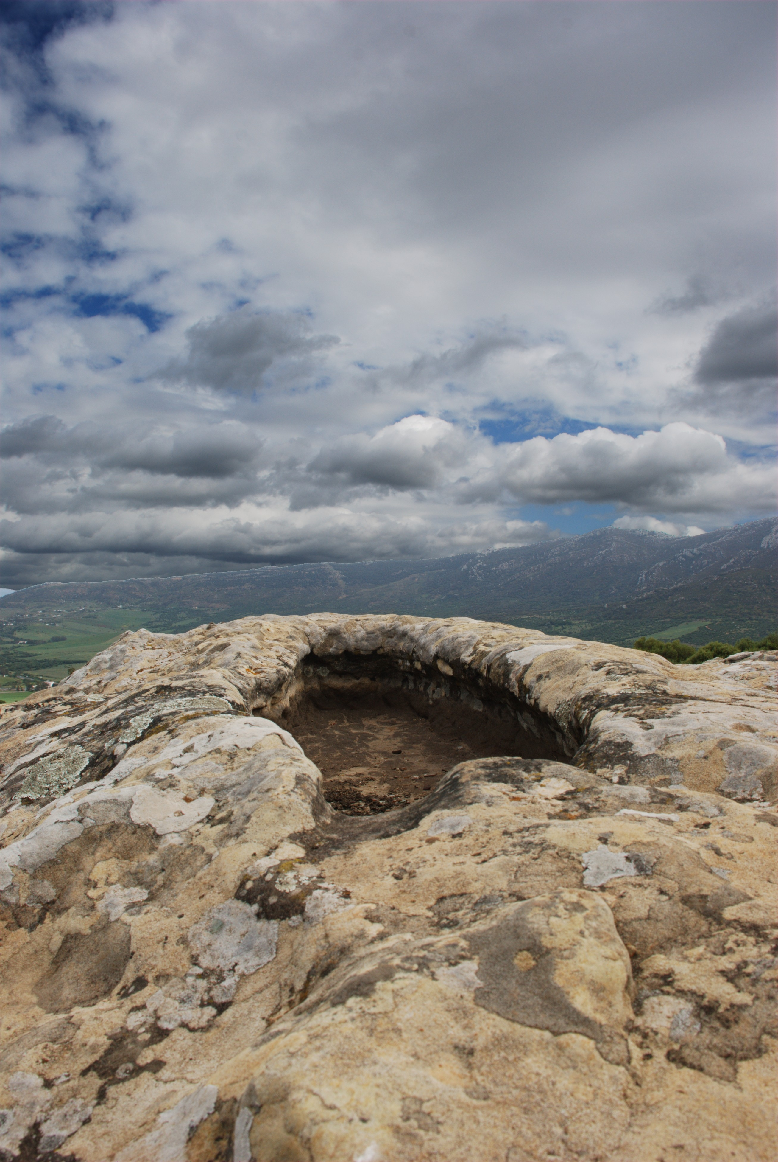 En el Municipio de Tarifa, cerca de Punta Paloma, está la aldea de Betis, donde hay unas grandes rocas con tumbas excavadas. Son las tumbas antropomorfas de la necrópolis de Betis, considerada tardorromana, visigótica, o alto-medieval.